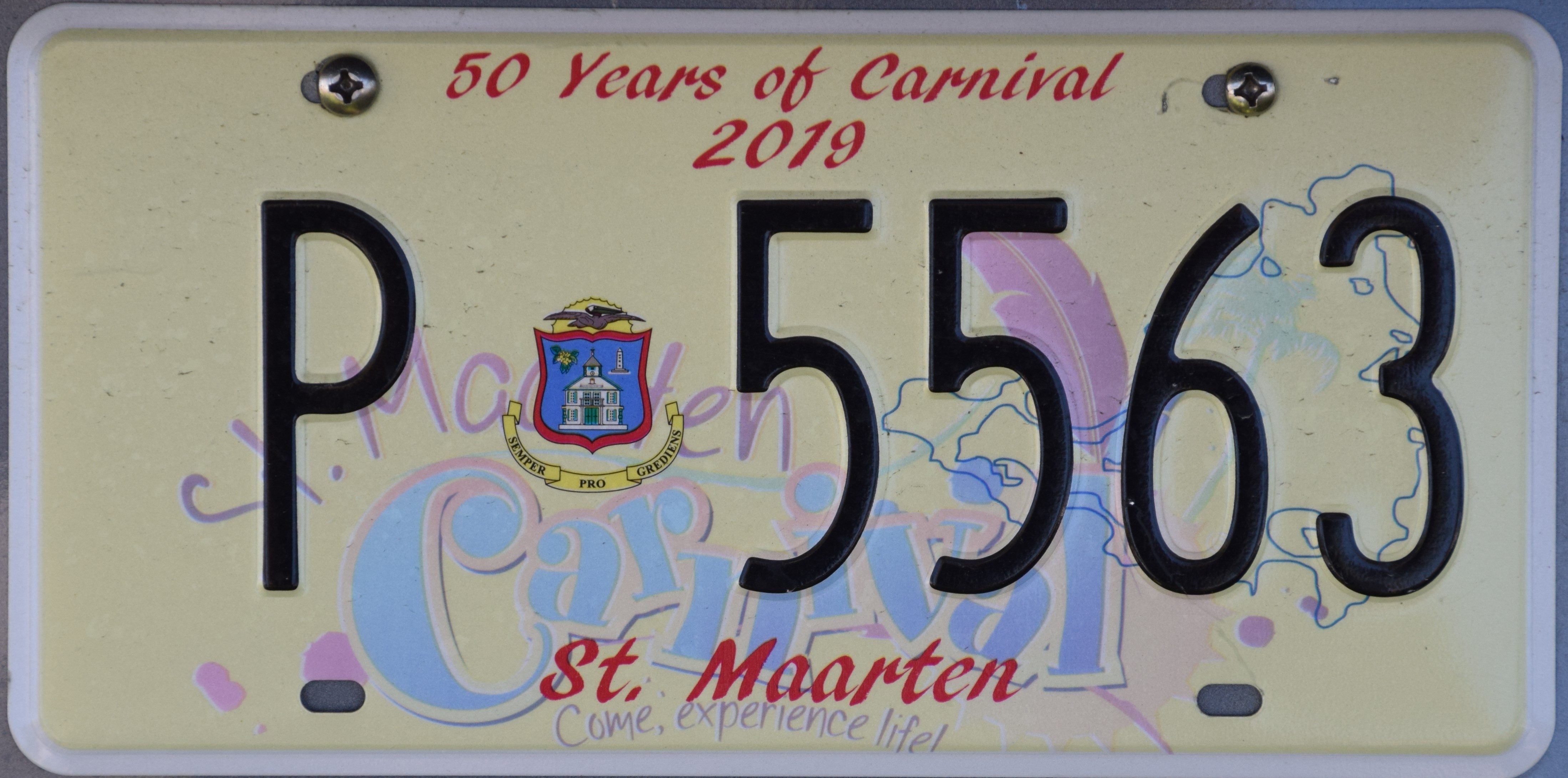 Kentekenplaat op Sint Maarten